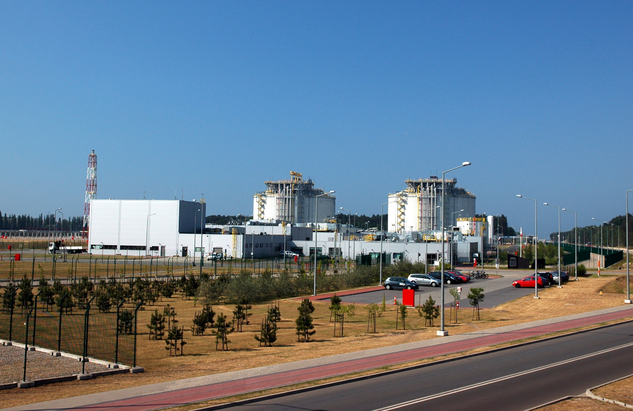 Terminal LNG w Świnoujściu